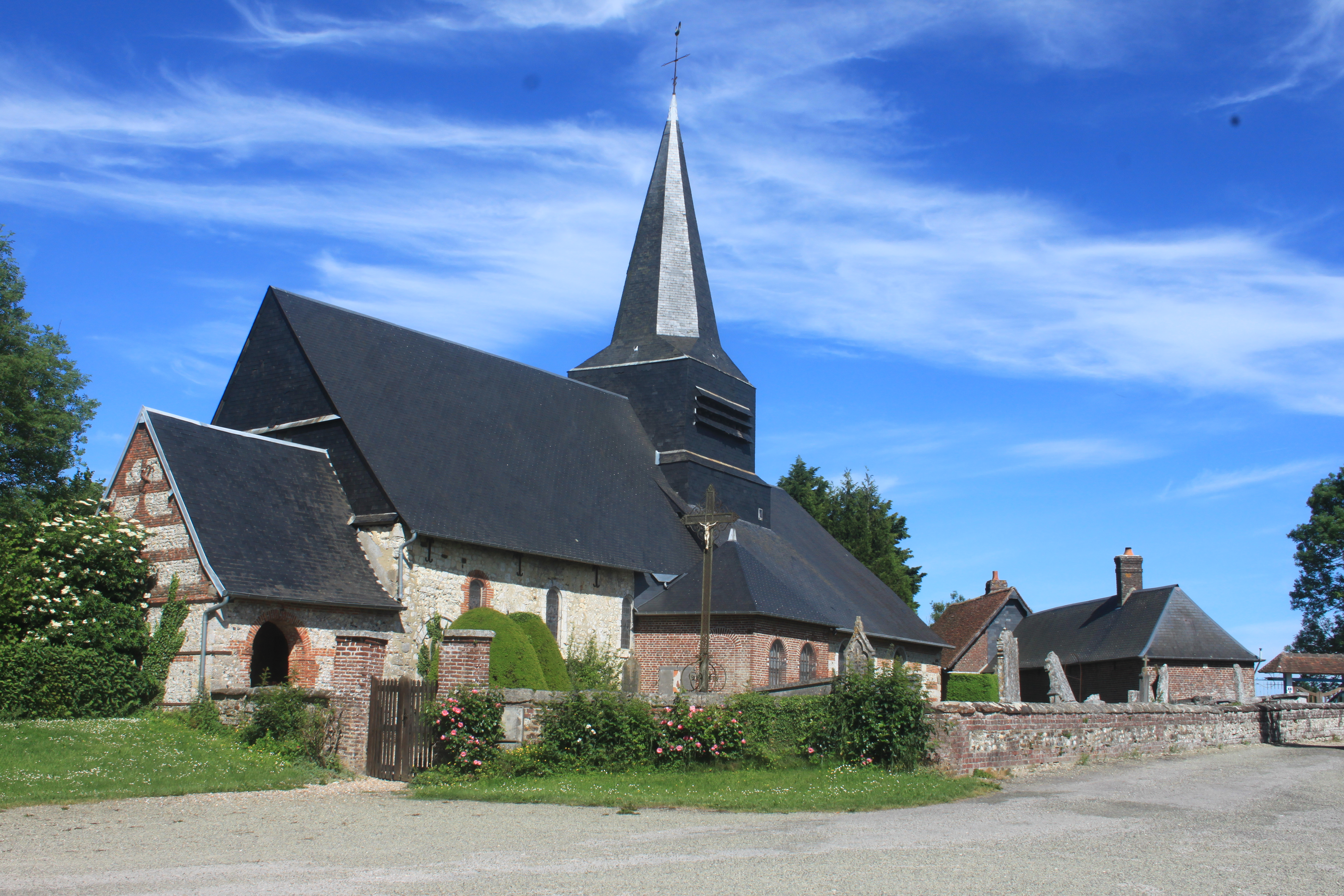 Eglise Saint-Pierre Saint-Paul de La-Ferté-en-Bray (La-Ferté-Saint-Samson, est née de la fusion de La-Ferté-en-Bray et de Saint-Samson )